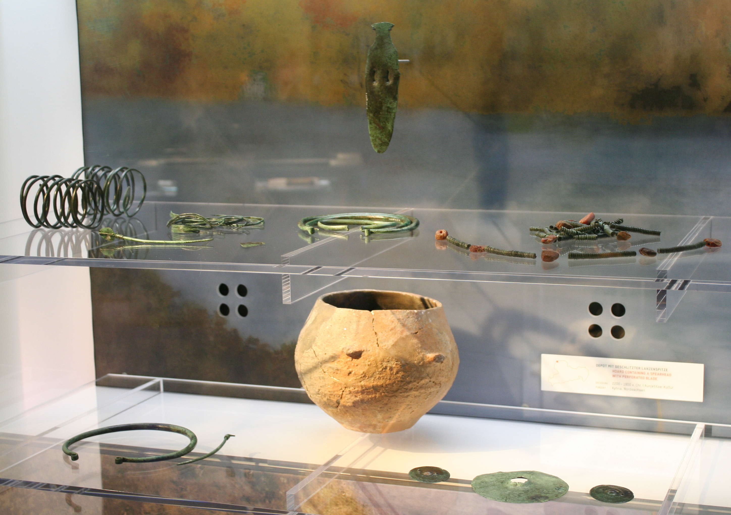 Depot mit geschlitzter Lanzenspitze der Aunjetitzer Kultur aus Kyhna, 2200-1800 v. Chr.; Staatliches Museum für Archäologie Chemnitz